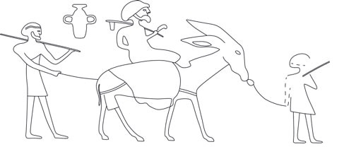 A redrawing of Sinai stela no. 92